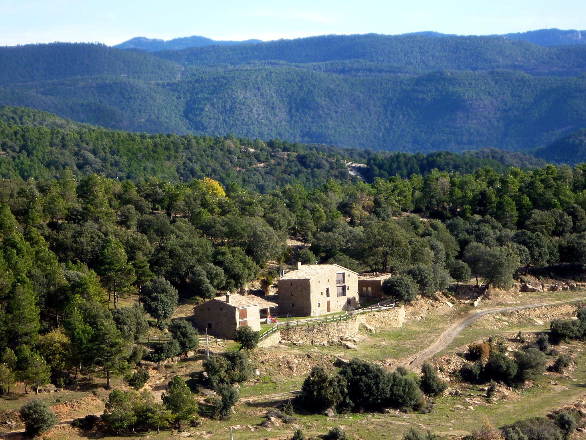 Masia de la Caseta de Dalt (Lladurs - Solsonès). Vista des del castell de Lladurs